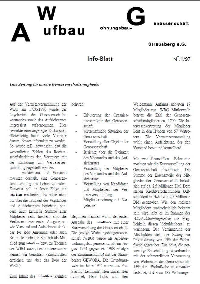 erste Ausgabe der Zeitschrift für die Mitglieder der Wohnungsbaugenossenschaft "Aufbau" Strausberg eG aus dem Jahr 1997